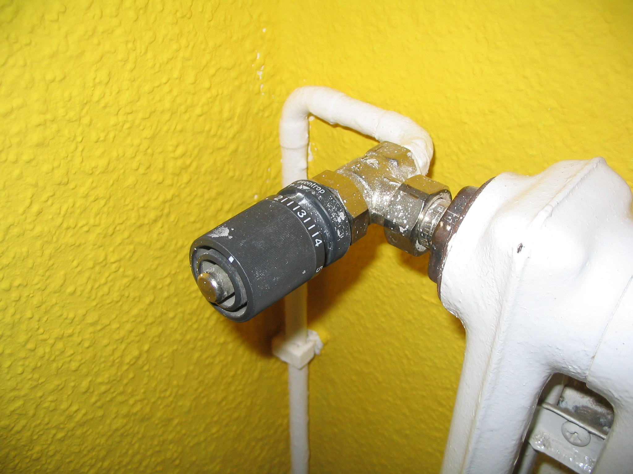 Valvola termostatica per riscaldamento domestico